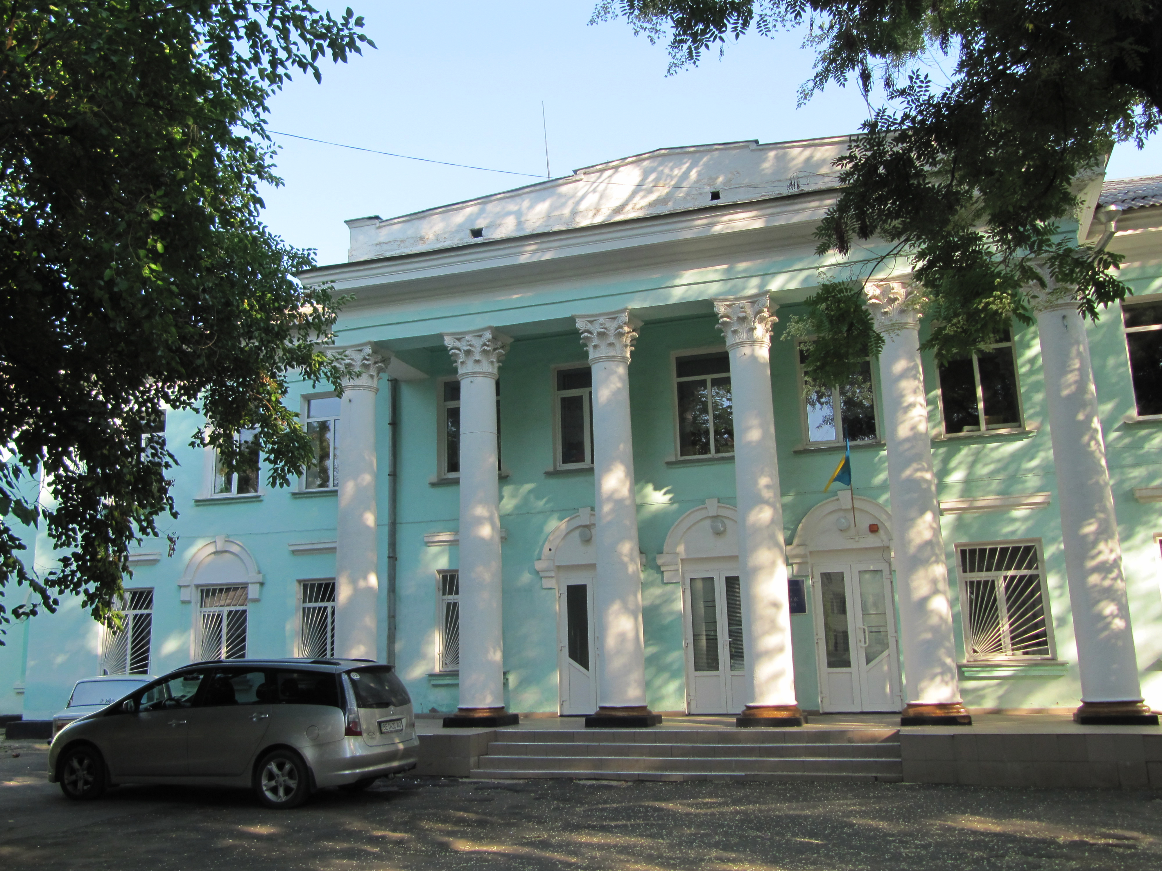 Вознесенськ, будинок культури Миколаївська весна у Вікіпедії